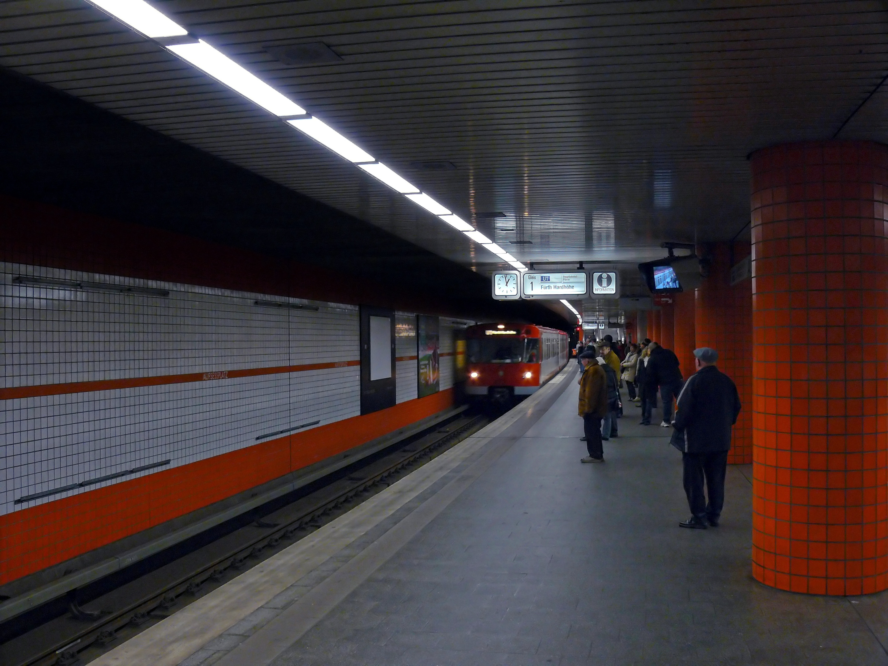 U-Bahnhof Aufseßplatz